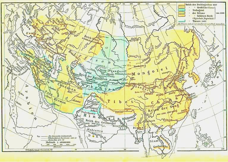 Reich der Mongolen aus: Putzgers, Historischer Schul-Atlas. 39. Auflage. 1917. Tafel 16b Friedrich Wilhelm Putzger (1849-1913)